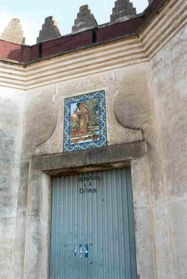 Fachada del Motor de San José, en Catadau (Valencia). Autor: Fev. Fecha julio 2002.